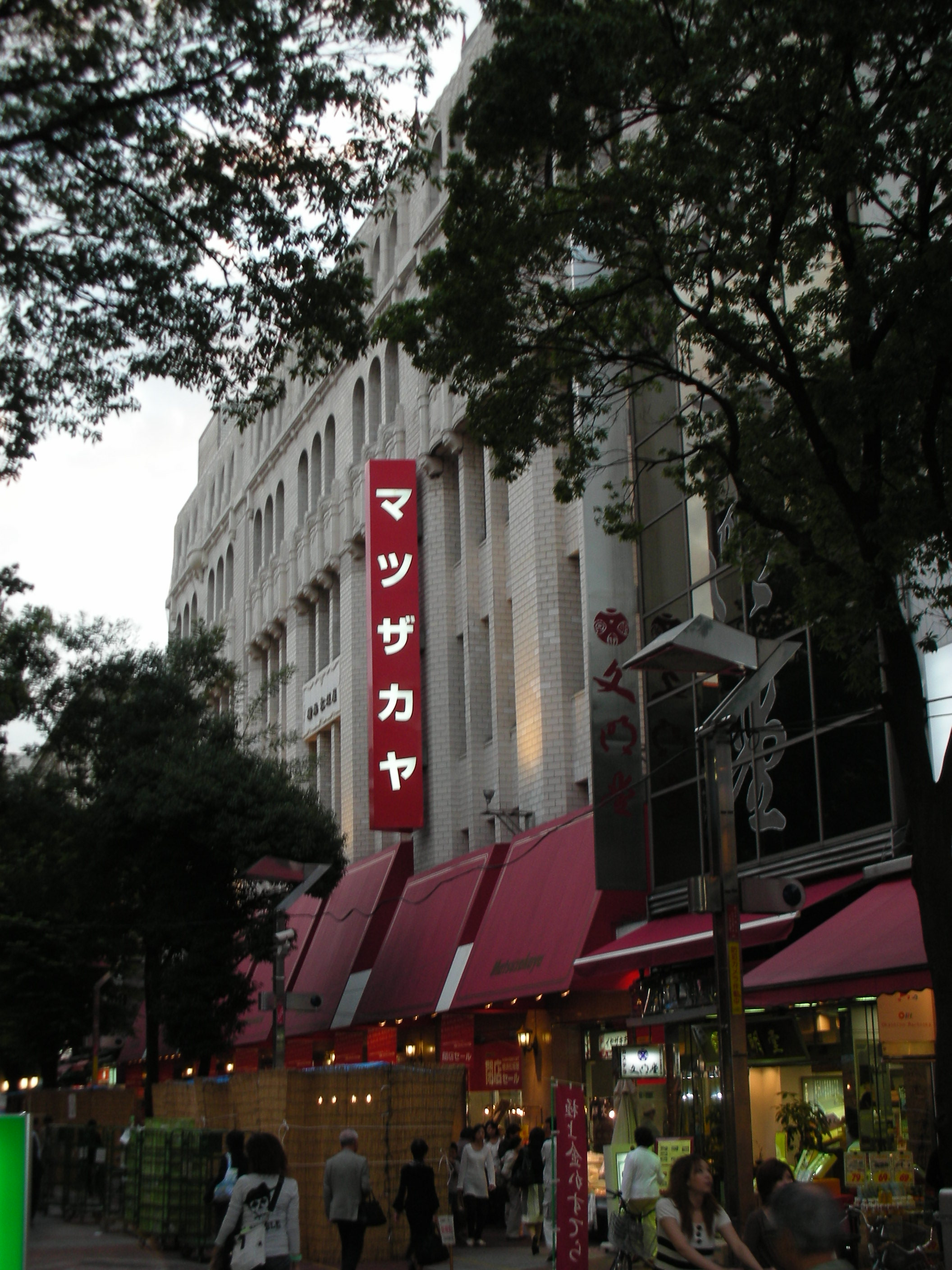 横浜松坂屋の外観